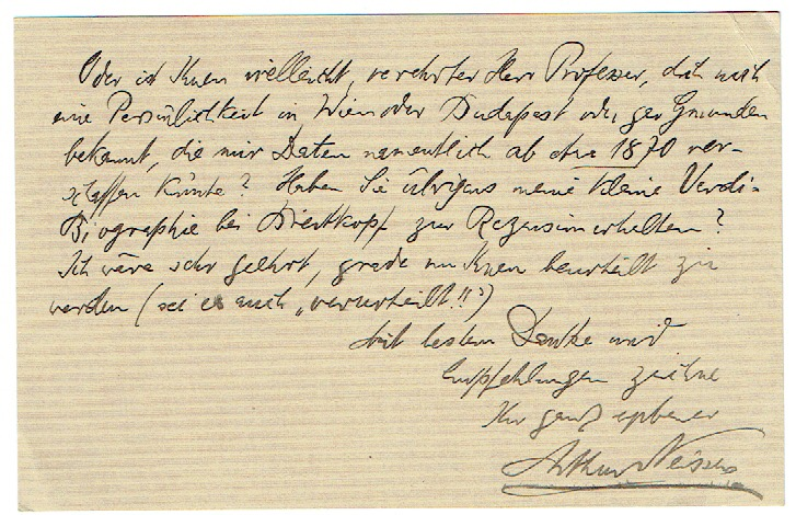 Schluss eines Briefs an Theodor Helm von Arthur Neisser, Berlin